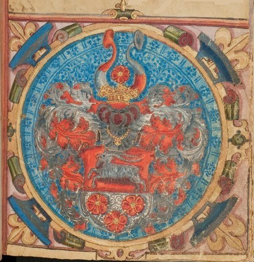 Wappen des Zacharias Hettler (Bruder des badischen Kanzlers Joseph Hettler)